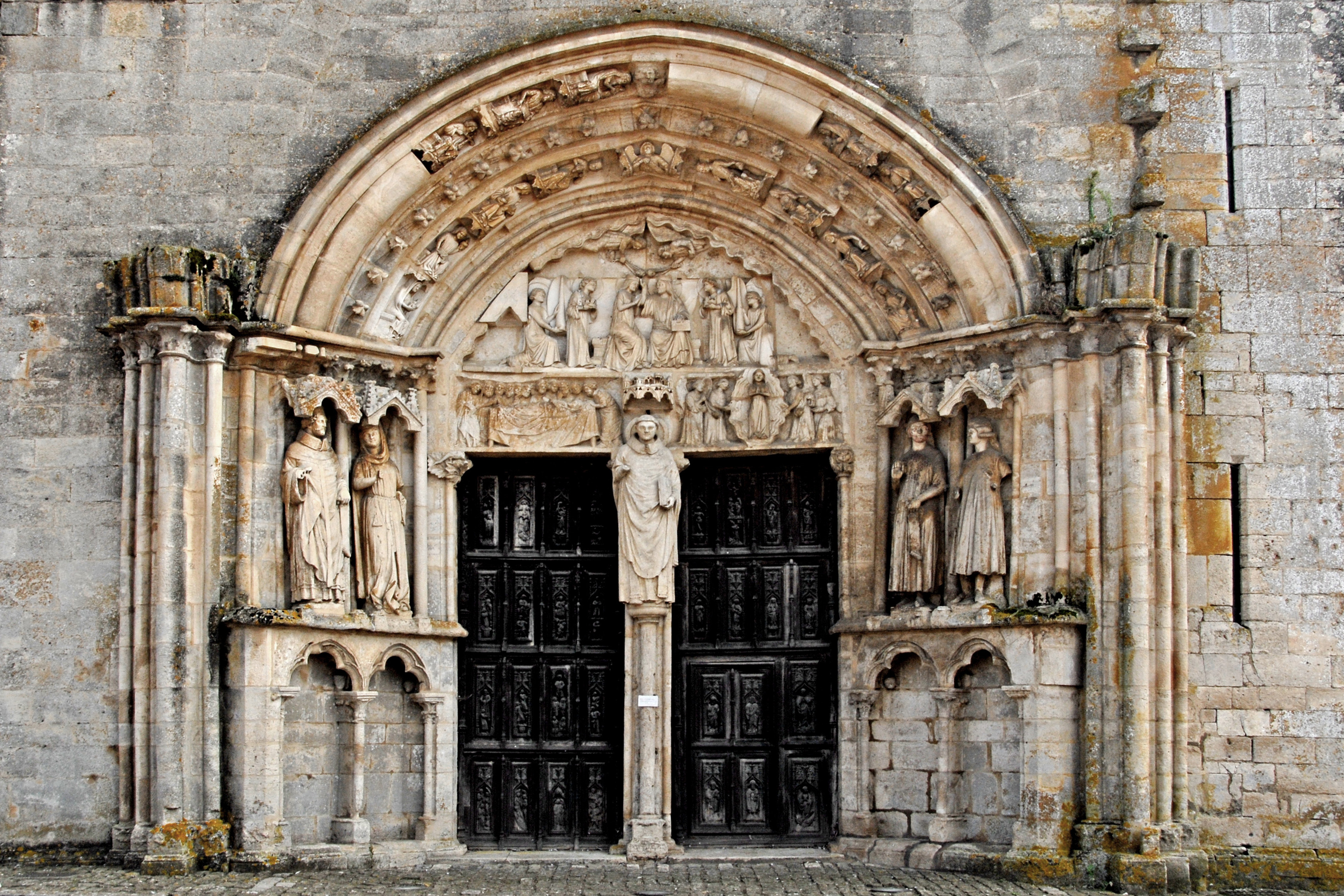 St-Thibault de Saint-Thibault, Nordportal